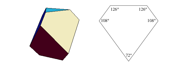 Reproduction d'après la page de Mathematica sur le solide de Dürer